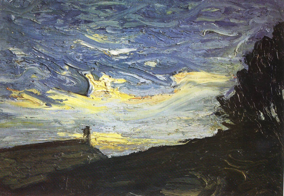 Dante Conte, Tramonto tempestoso, olio su cartone, cm.25 x 34